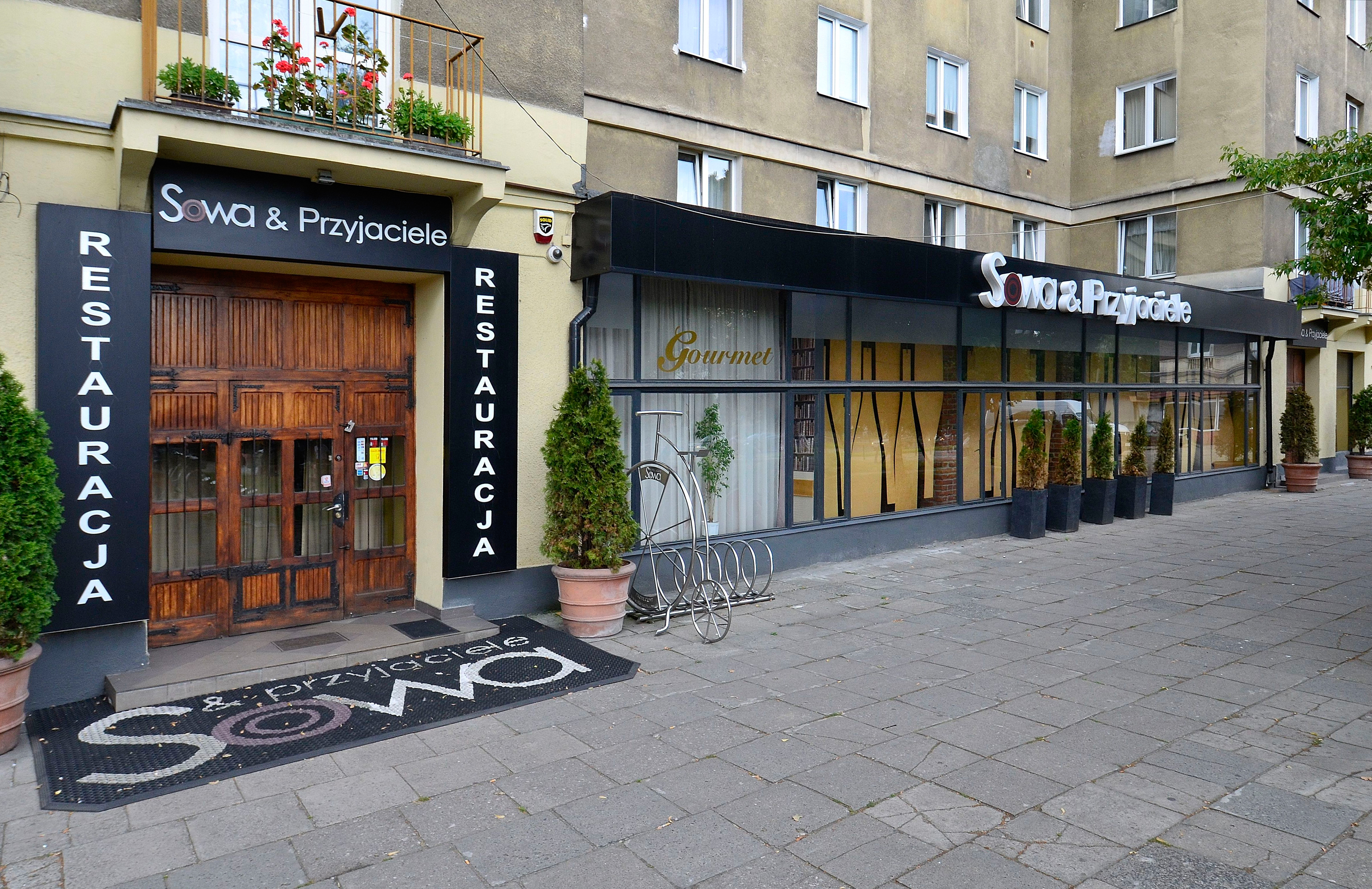 Należąca do Roberta Sowy restauracja Sowa & Przyjaciele przy ul. Jurija Gagarina 2 (widok od ul. Czerniakowskiej) w Warszawie